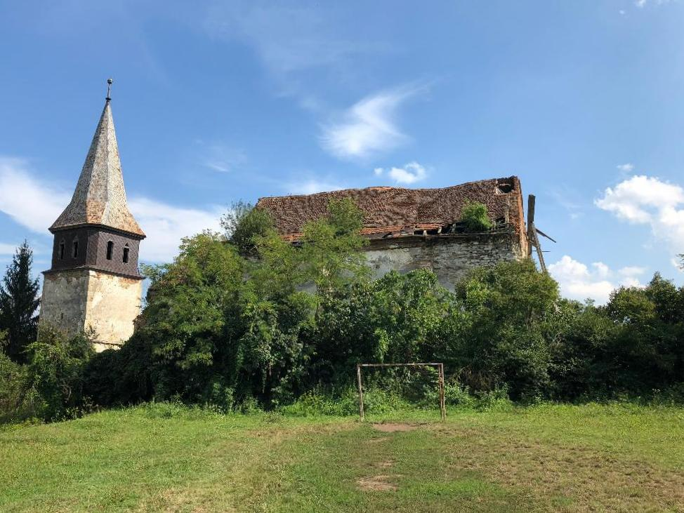 Ansamblul bisericii evanghelice C.A., azi Ansamblul bisericii ortodoxe „Sf. Mihail și Gavriil”, sat Vermeș; comuna Lechința nr 18 A sec. XV - XX